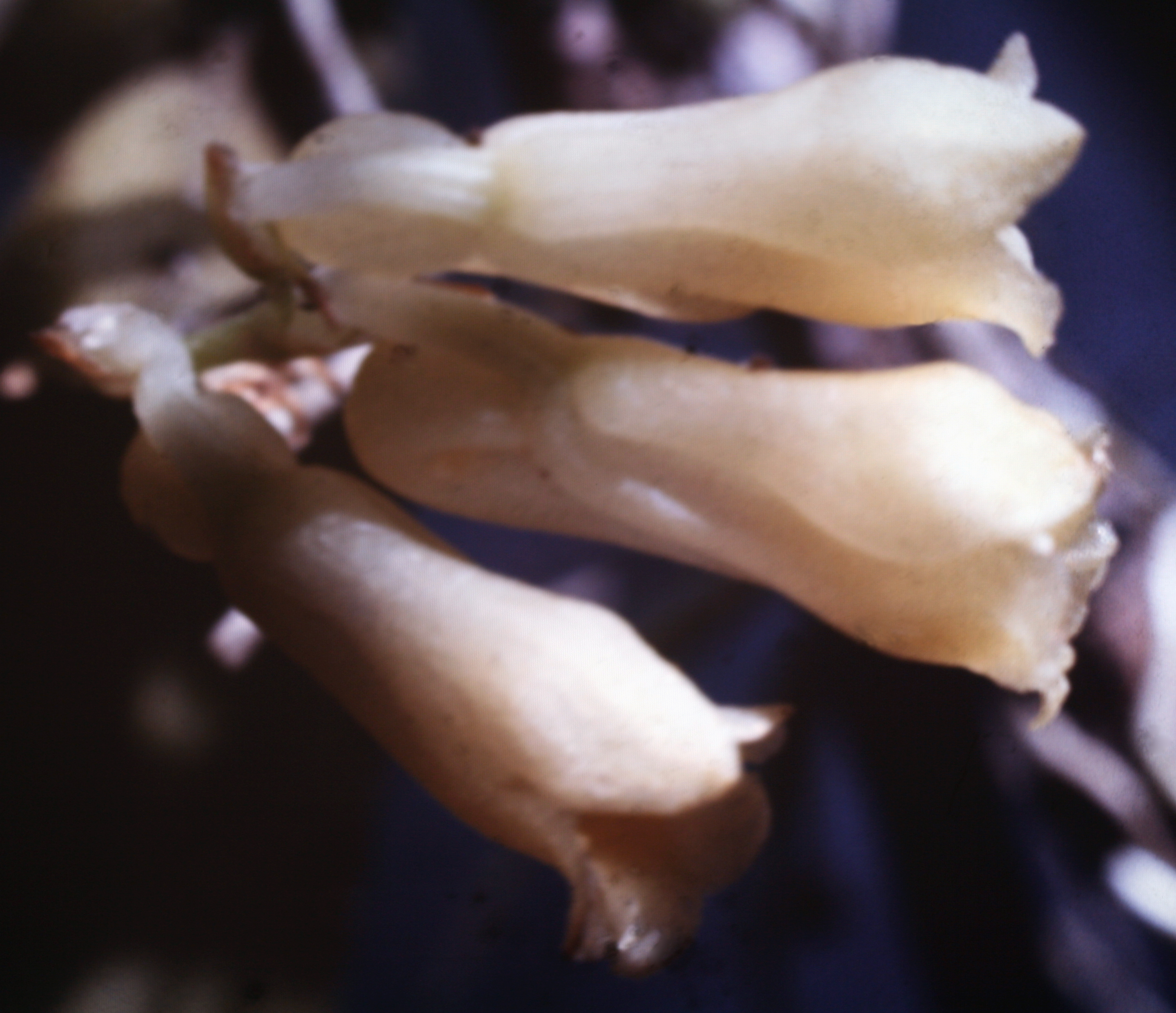 Rodriguezia flavida, Suriname.